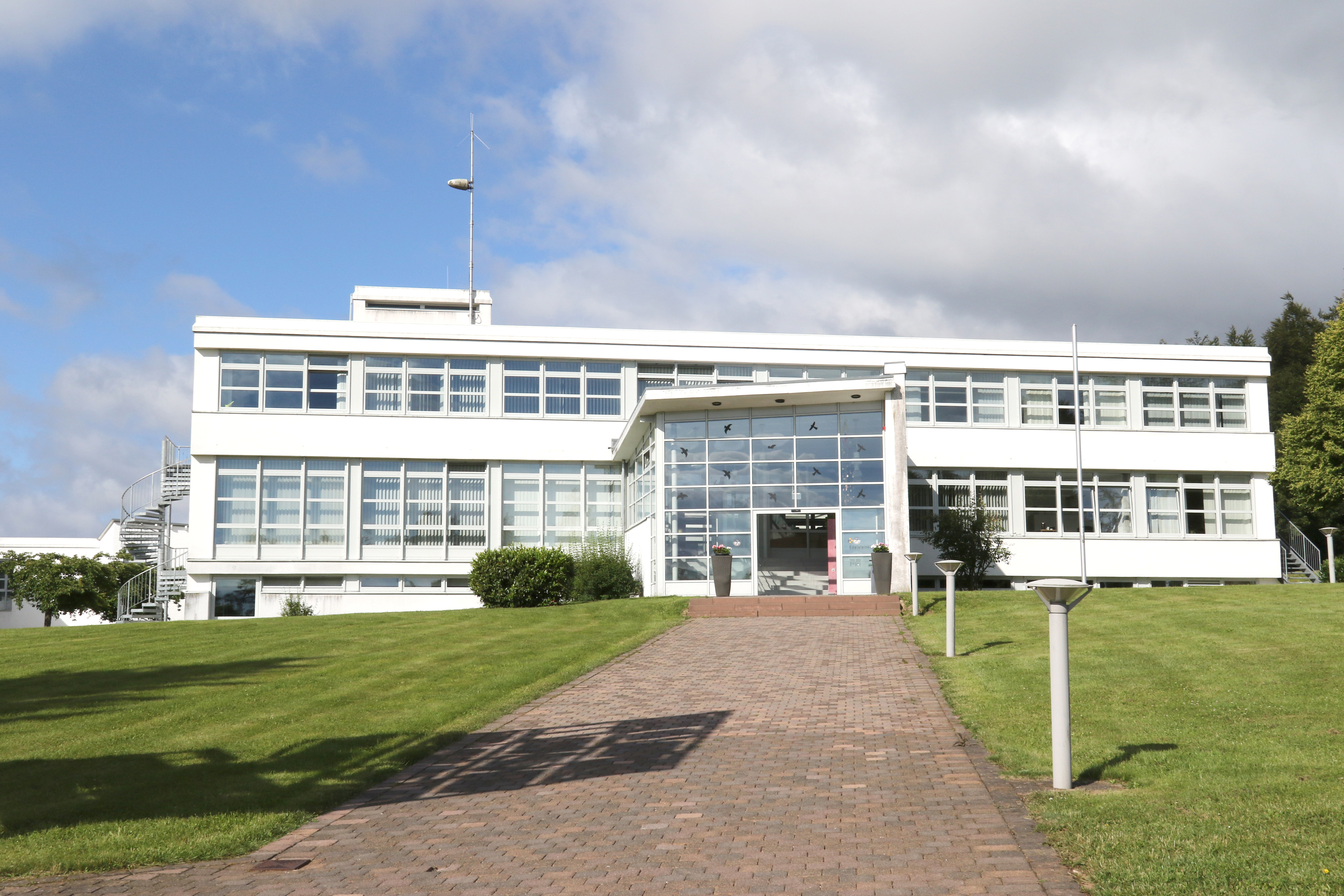 Außenansicht der Edelsteinklinik in Bruchweiler. Fotograf: Walter Hoinka